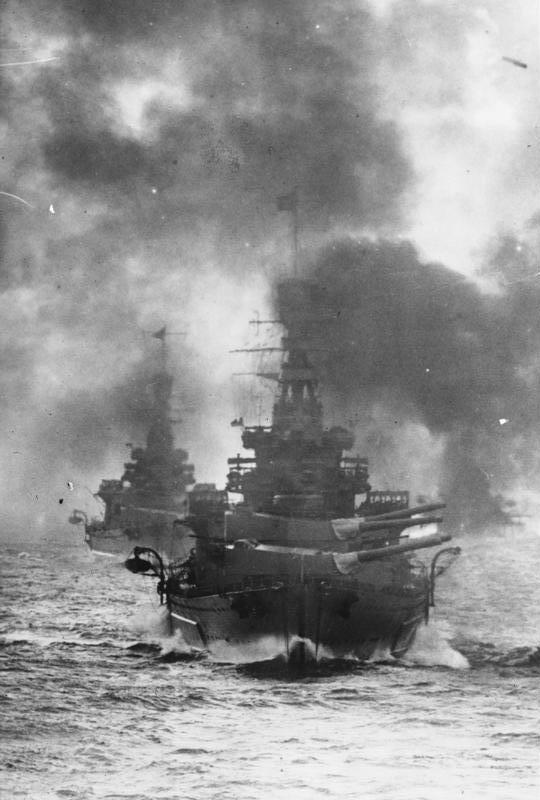 Mit Volldampf voraus! Ausfahrt der englischen Schlachtflotte zu einer Übung. Im Vordergrund der grosse englische Schlachtkreuzer "Renoven".